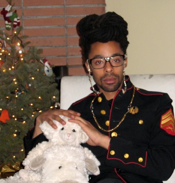 Makode Linde in Hollywood christmas 2008